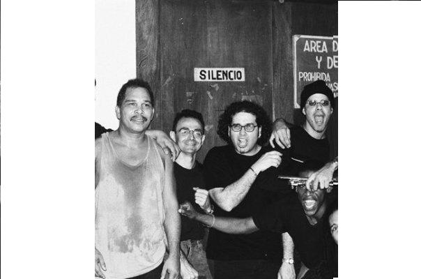 El grupo dominicano de rock "Transporte Urbano" en Nueva York, a comienzos de los años noventa